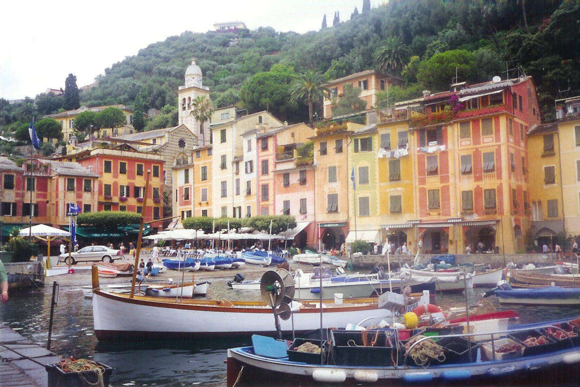 Portofino (Italien).